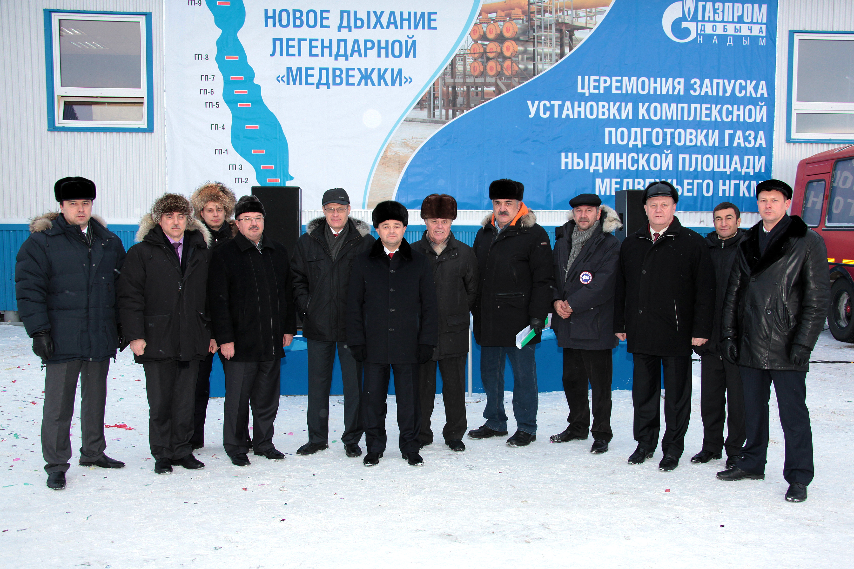 Участники церемонии запуска УКПГ-Н на Ныдинском участке Медвежьего месторождения. Крайний справа: Максим Николаевич Гагарин, заместитель генерального директора ООО «ТюменНИИгипрогаз» по проектно-изыскательским работам — руководитель ПИР. Надымский район, Ямало-Ненецкий автономный округ, Тюменская область. 1 декабря 2011 года